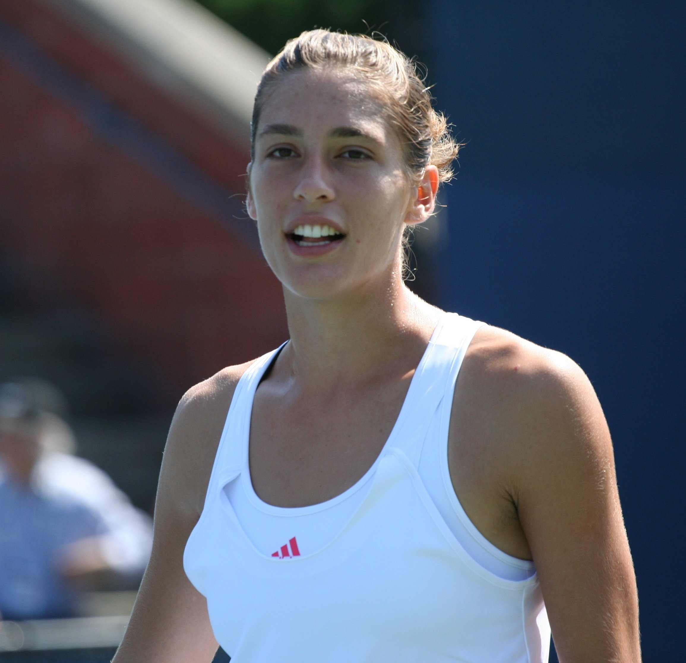 U.S. Open Saturday, Sept. 5, 2009